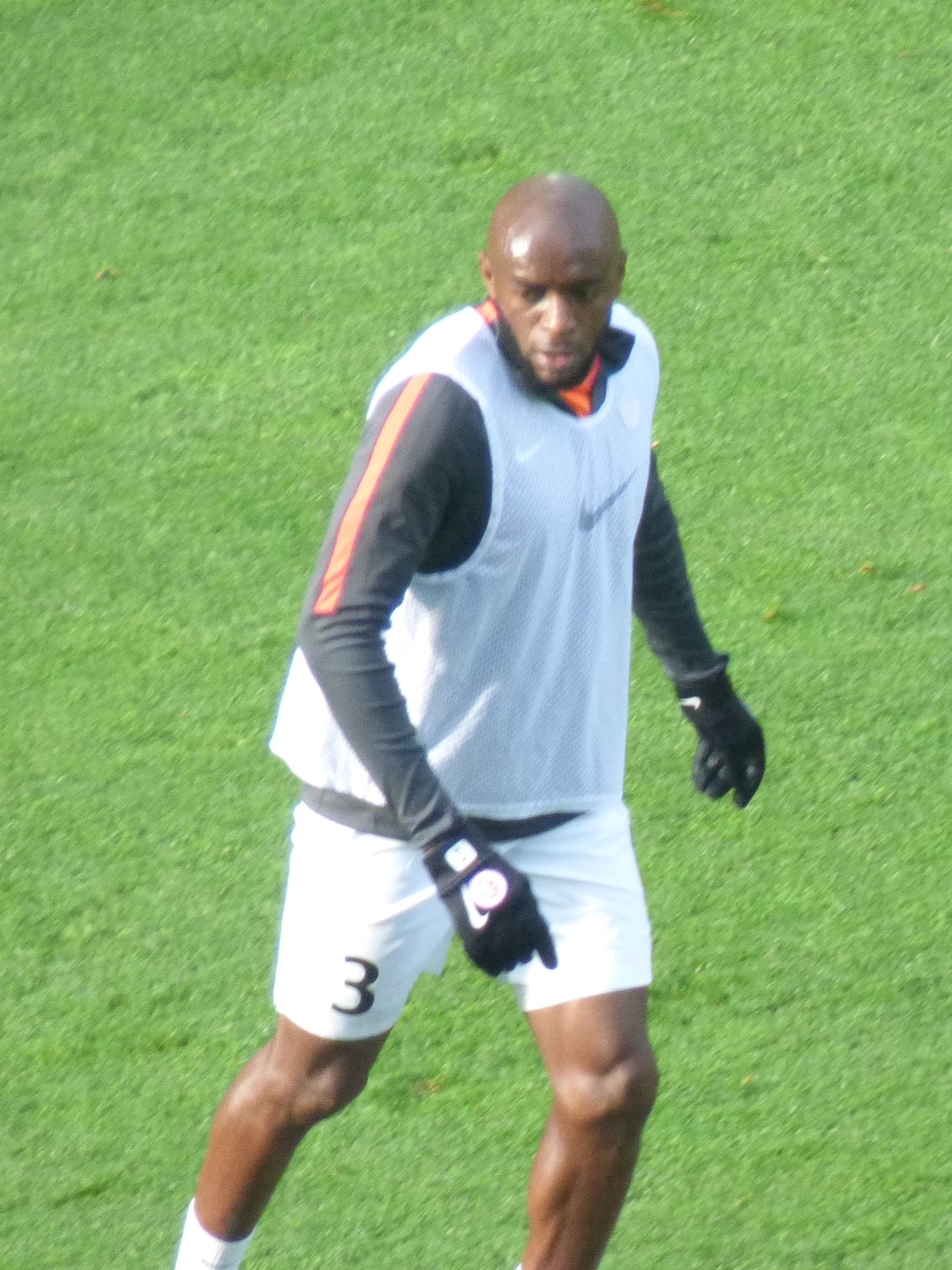 Yannick M'Boné avant le match RC Lens / LB Châteauroux, le 3 novembre 2018, comportant pour la treizième journée du championnat de France de football de Ligue 2, au Stade Bollaert-Delelis.